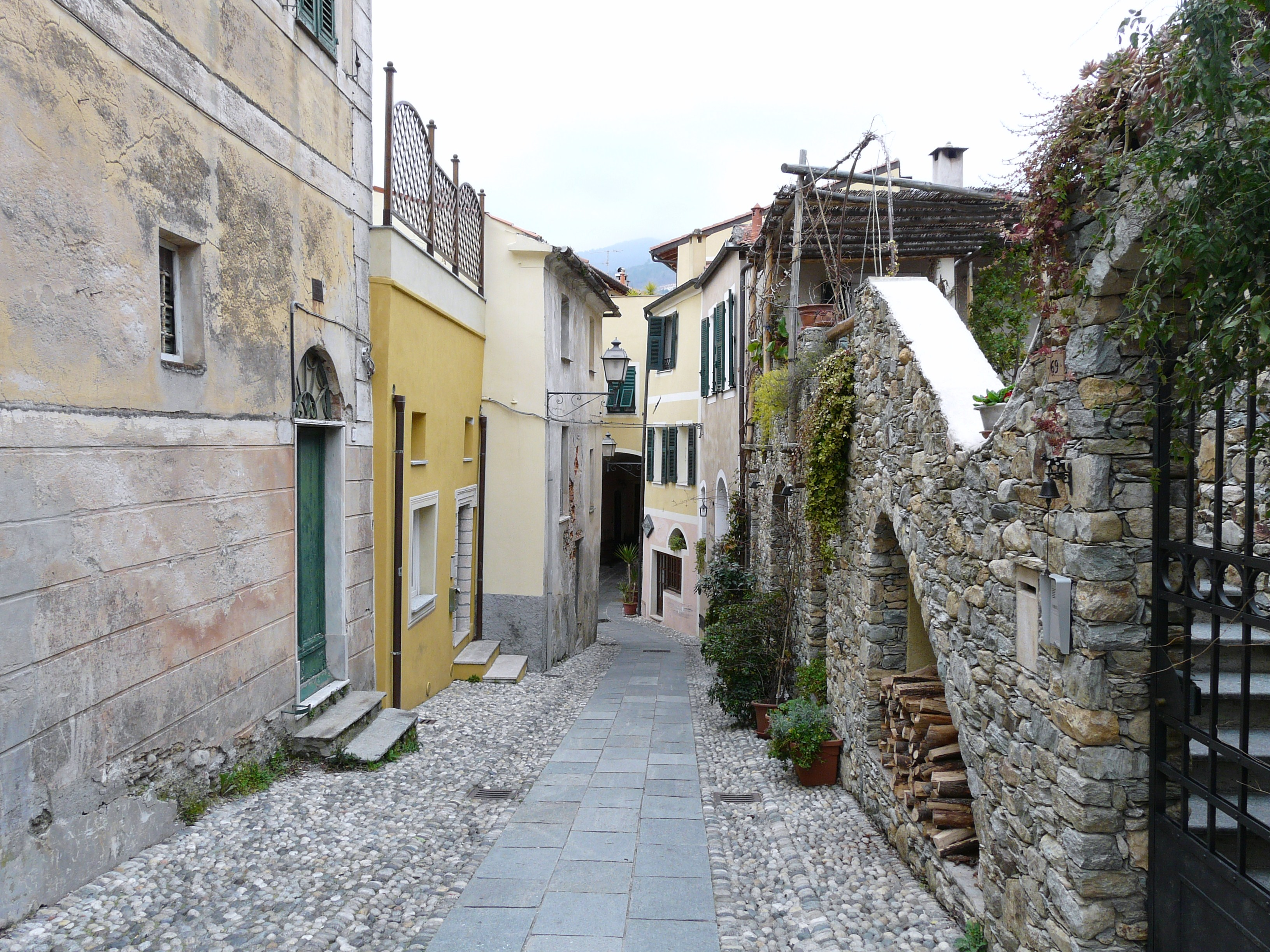 Centro storico, Calice Ligure, Liguria, Italia